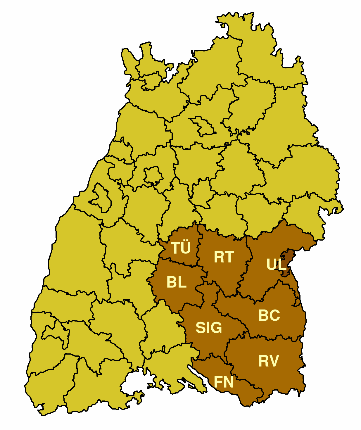 Karte der Landkreise im Regierungsbezirk Tübingen.